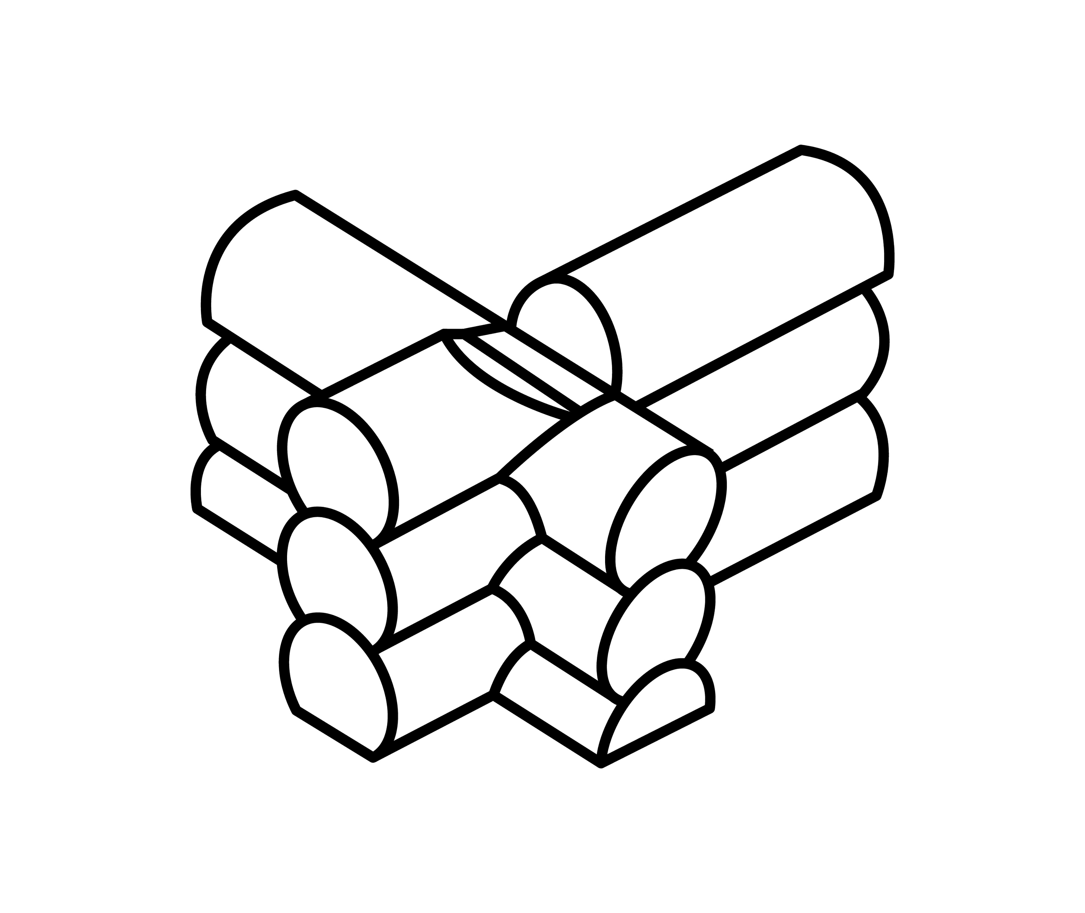 Koerakaelanurk